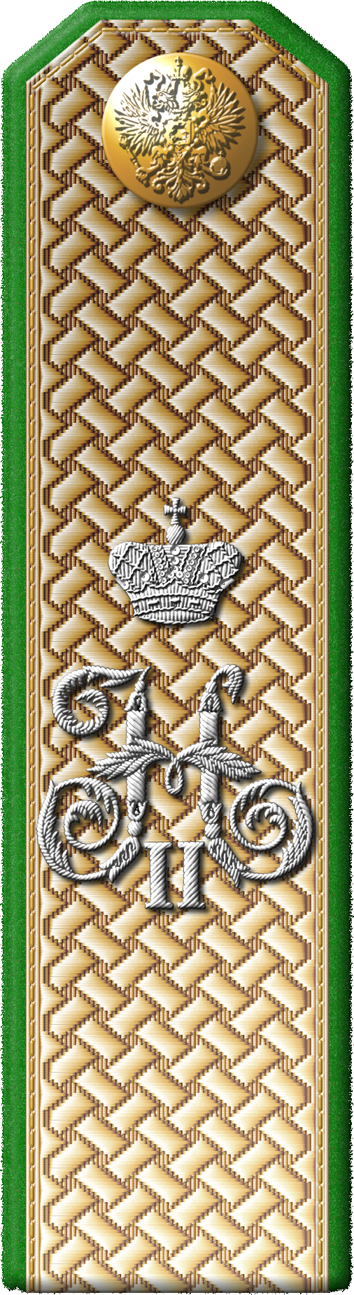 Российская Империя. Министерство финансов Российской империи Отдельный корпус пограничной стражи Знаки различия: погоны по состоянию на 1901-1917 г. Чин/звание: Действительный Тайный советник, Статс-секретарь в должности Шефа Отдельного корпуса пограничной стражи (Министра финансов). Персоналии: Витте С.Ю. 1902-1903 гг. Коковцов В.Н. 1908-1914 гг. Шипов И.П. 1905-1906 гг. Первичные источники: Полное собрание законов Российской империи собр. 3, № 14896 от 16 января 1898г. Полное собрание законов Российской империи собр. 3, № 20037а от 6 мая 1901г.